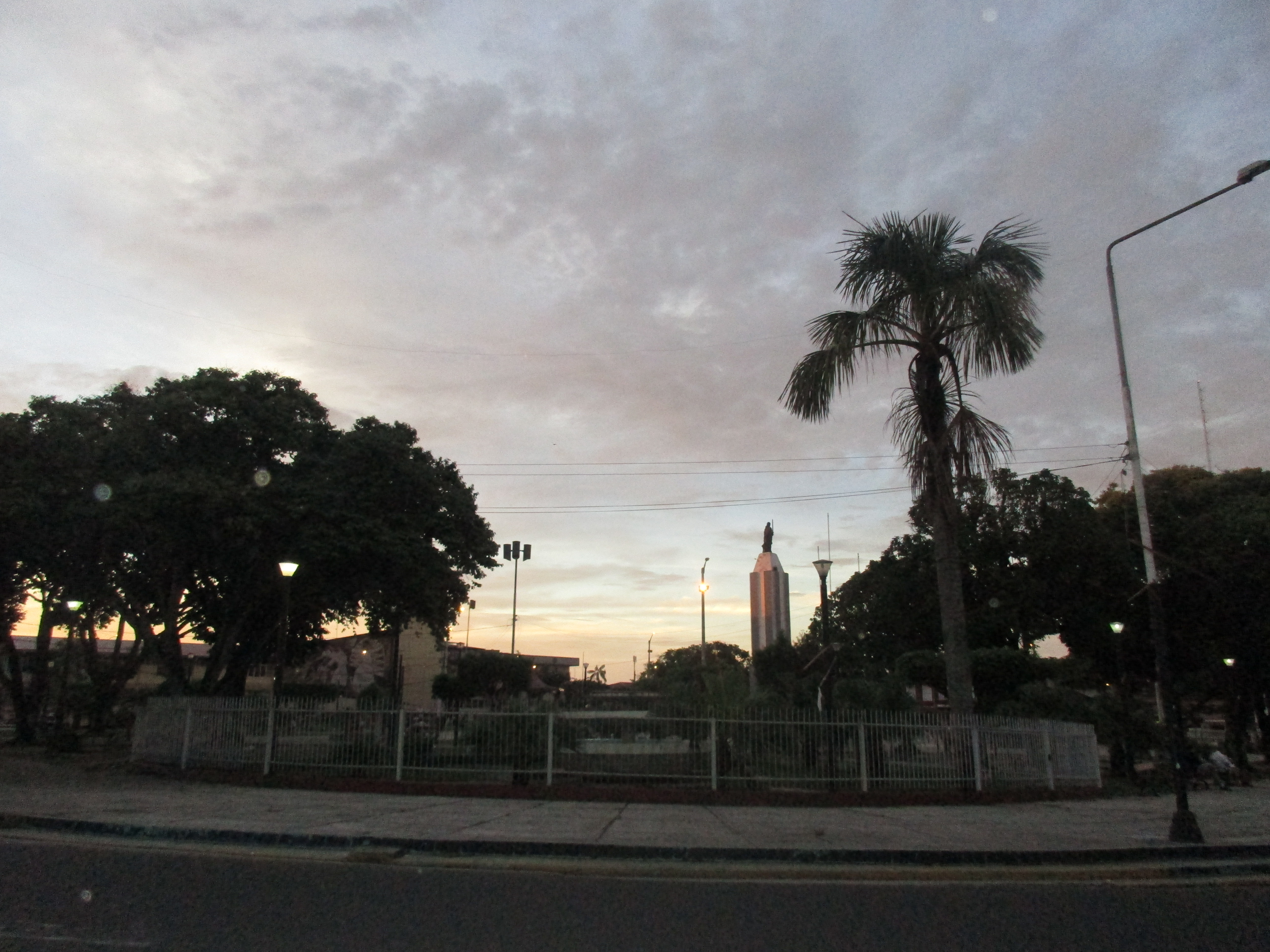 Plaza 28 de julio por la tarde Iquitos